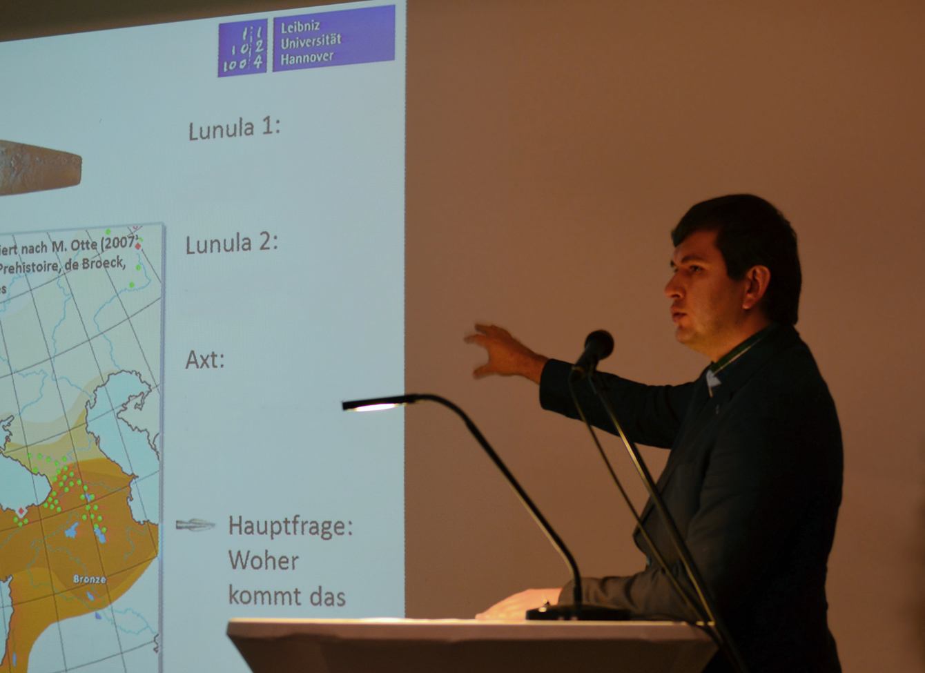 Der Archäometallurg Robert Lehmann zu den Funduntersuchungen